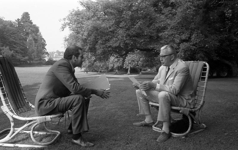 6.9.1969 Office de Radiodiffusion Télévision Francaise (ORTF) Interview mit Bundeskanzler Kurt Georg Kiesinger